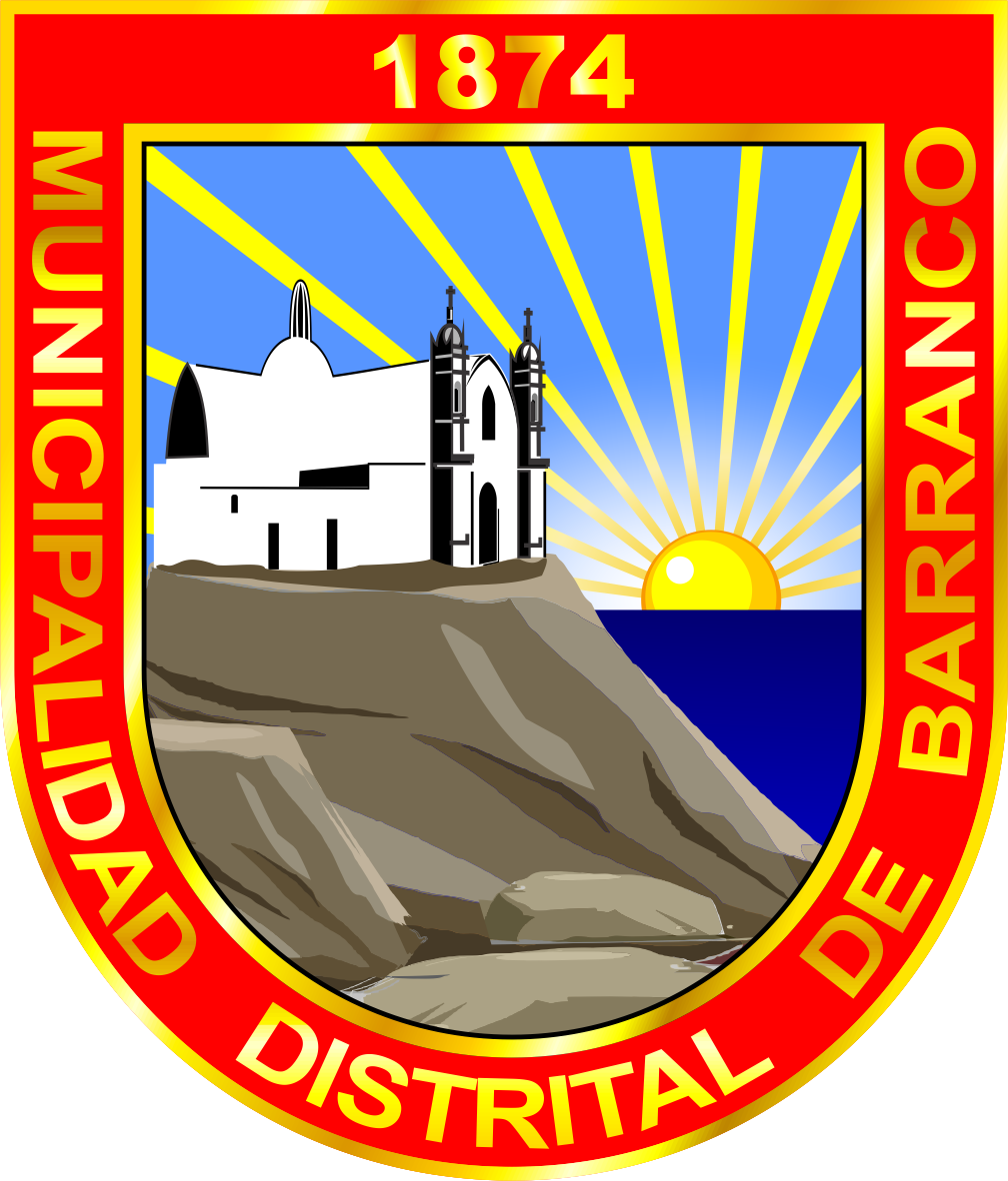 Distrito de Barranco - Provincia de Lima - Región Lima